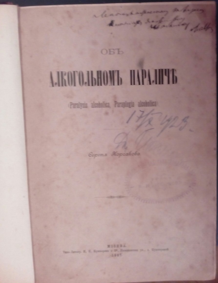 Об алкогольном параличе (Ob alkogol’nom paraliche) - 1887 - copia con dedica dell’autore